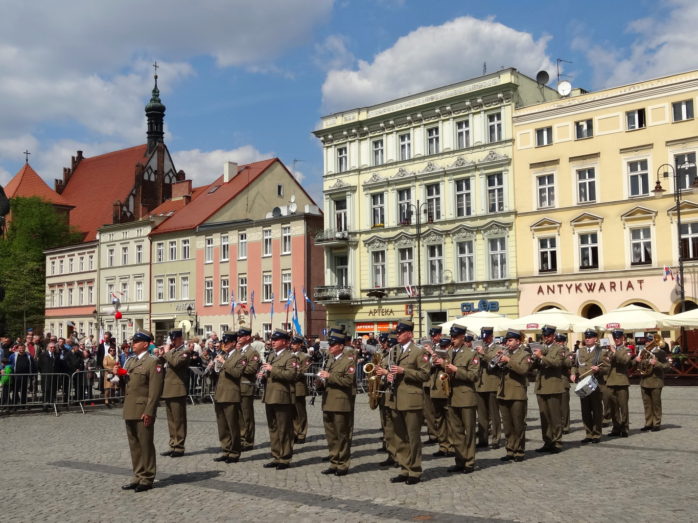 Orkiestra Wojskowa z Bydgoszczy podczas Święta Konstytucji 3 Maja 2015 roku na Starym Rynku w Bydgoszczy